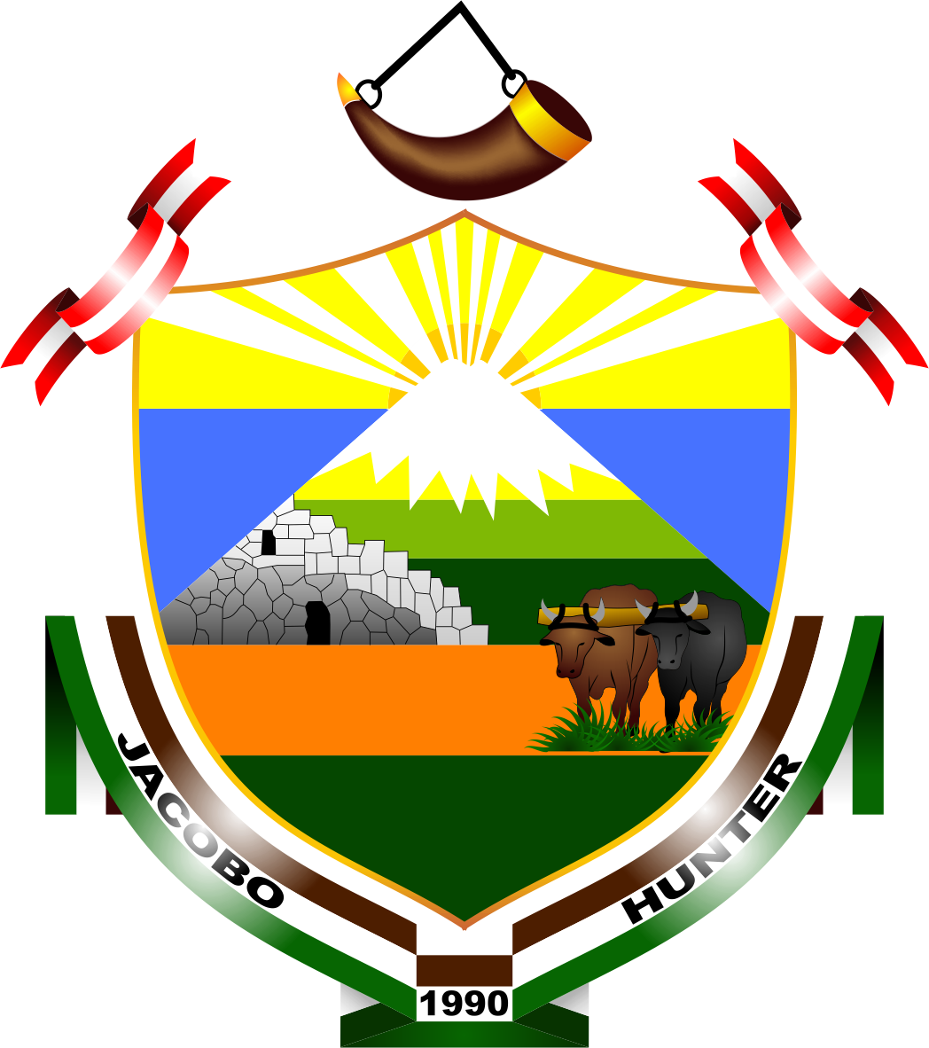 Distrito de Hunter